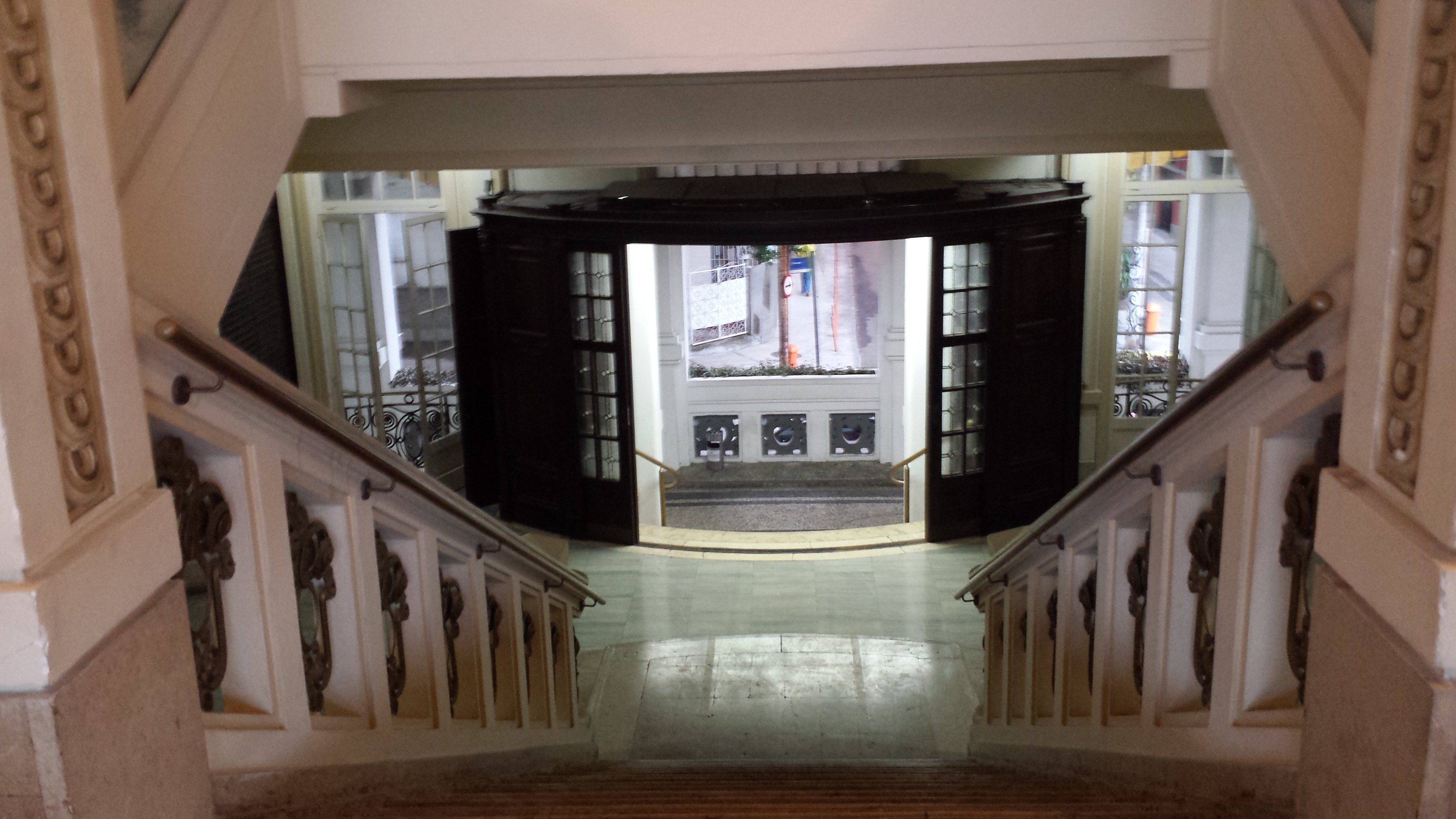 Escada que leva ao Salão Nobre do Fluminense Football Club.